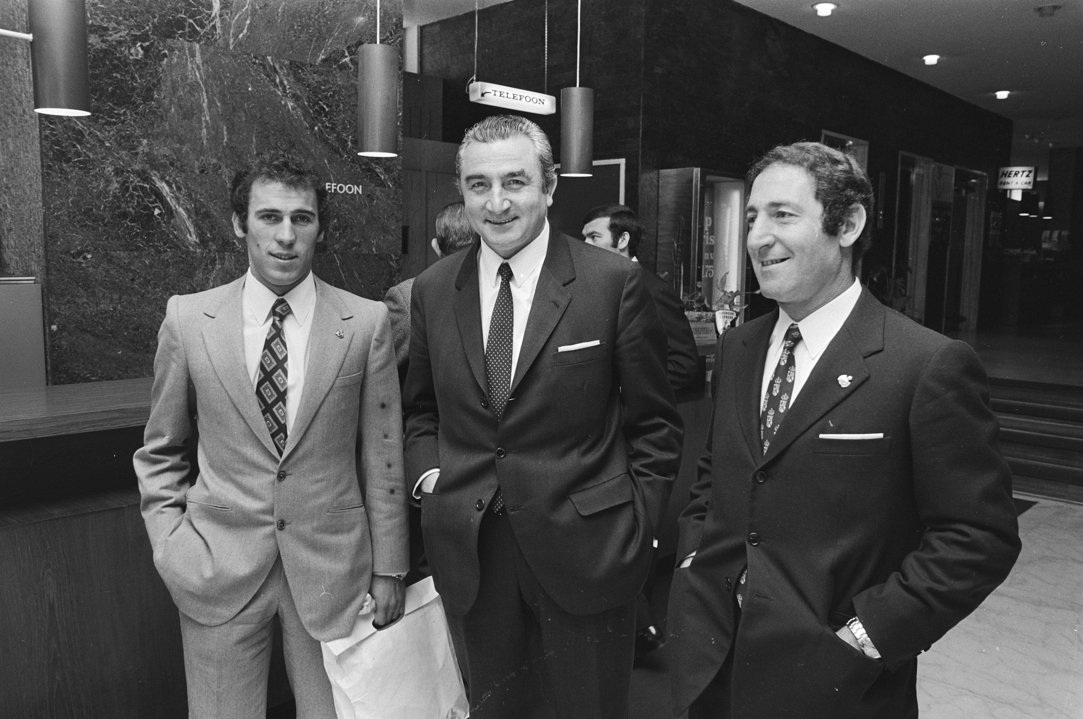 Collectie / Archief : Fotocollectie Anefo Reportage / Serie : Bezoek van het elftal van Real Madrid aan het Evoluon in Eindhoven Beschrijving : V.l.n.r. Amancio, Miguel Muñoz (trainer), Gento Annotatie : Het Evoluon was van 1966 tot 1989 een educatief technologiemuseum; sinds 1996 is het een congrescentrum Datum : 13 april 1971 Locatie : Eindhoven, Noord-Brabant Trefwoorden : musea, spelers, sport, trainers, voetbal Persoonsnaam : Amaro, Amancio, Gento, Francisco, Muñoz, Miguel Instellingsnaam : Real Madrid Fotograaf : Fotograaf Onbekend / Anefo Auteursrechthebbende : Nationaal Archief Materiaalsoort : Negatief (zwart/wit) Nummer archiefinventaris : bekijk toegang 2.24.01.05 Bestanddeelnummer : 924-4486